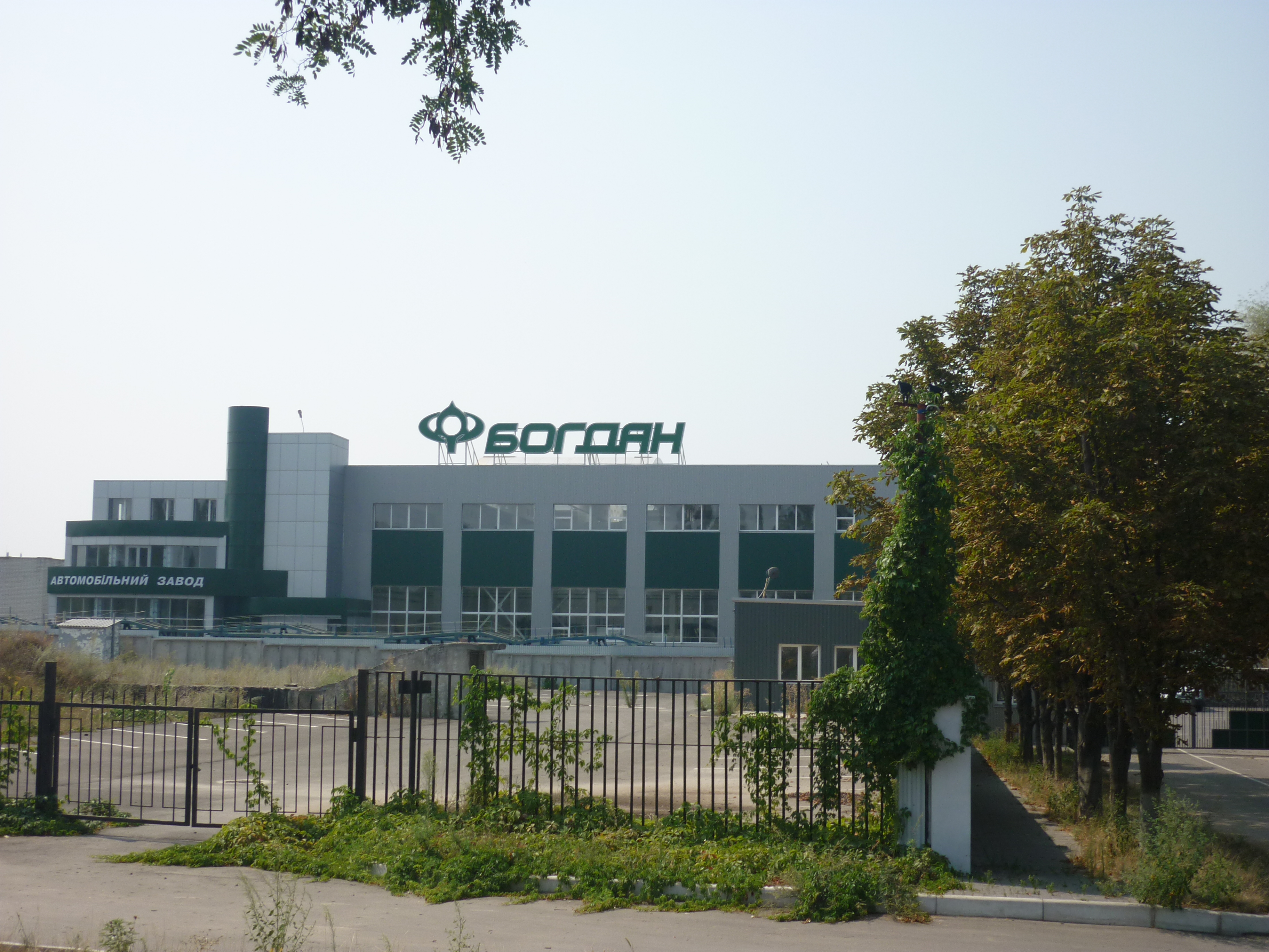 Автомобільний завод "Богдан2 (вантажний) в Черкасах